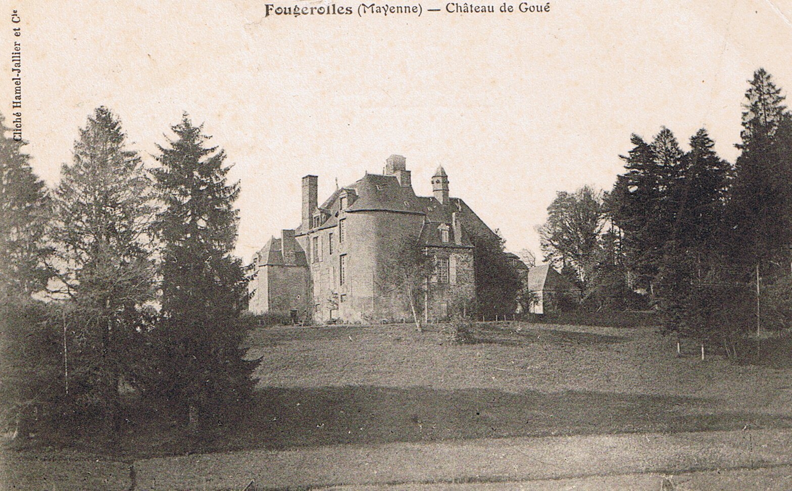 Chateau de Goué